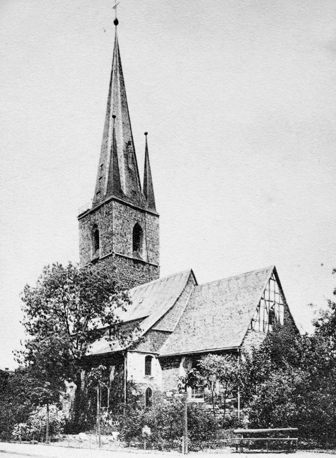 Die St.-Petri-Kirche Außenansicht